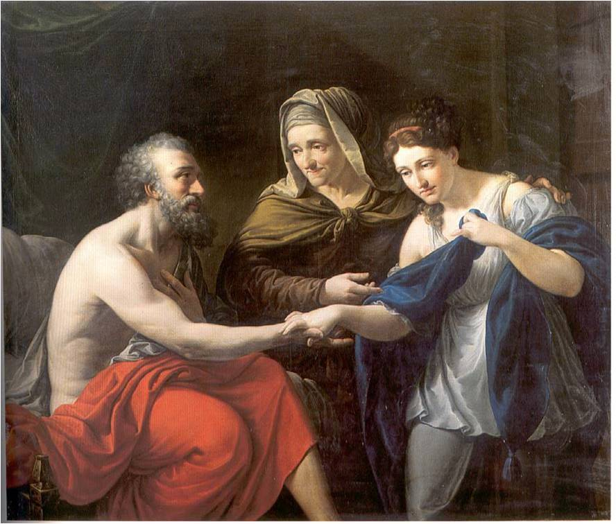 El lienzo representa al patriarca hebreo Abraham en el momento en que su anciana esposa Sara le presenta a su esclava egipcia, Agar, para que Abraham engendrara hijos con ella.